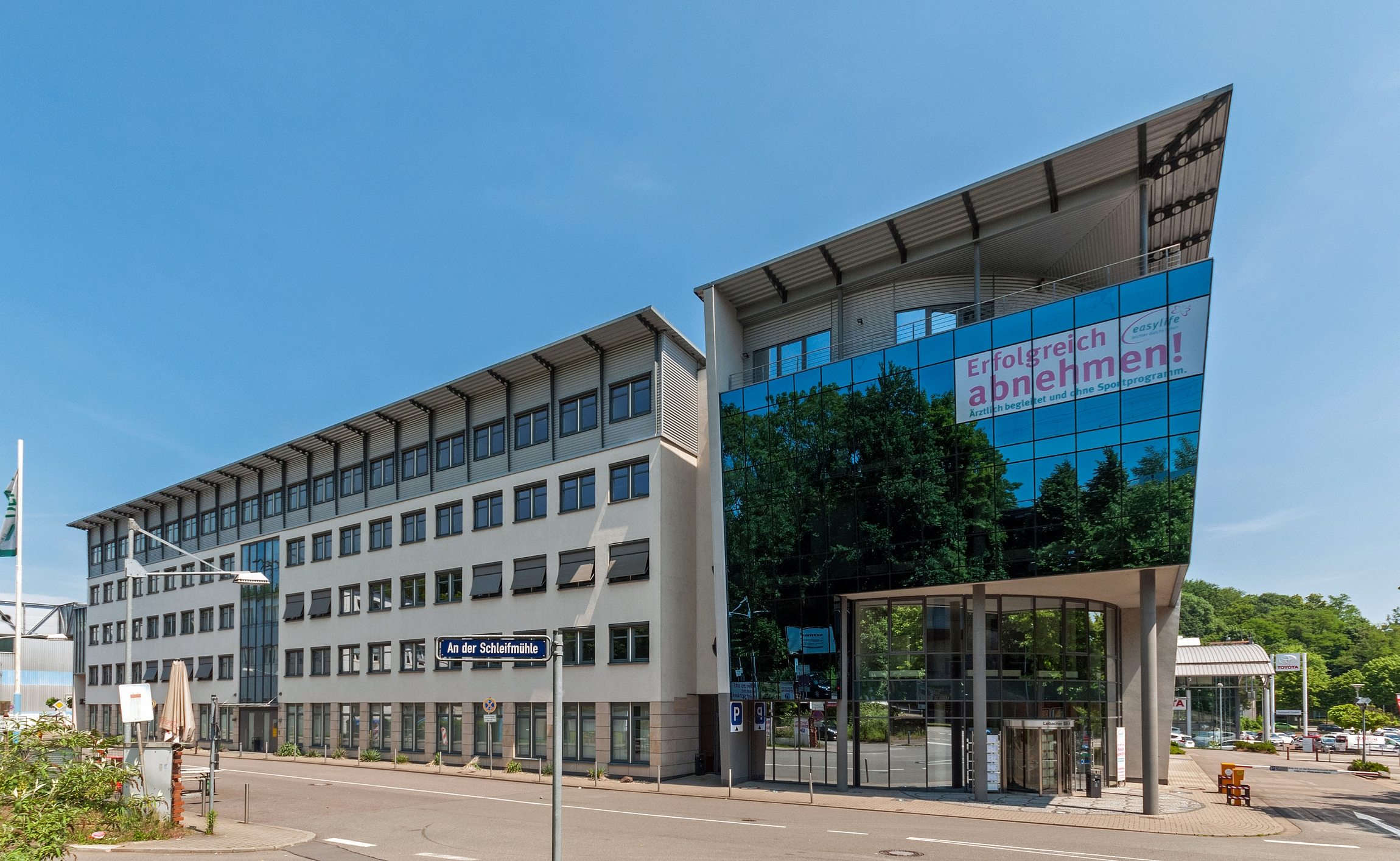 Die französische Außenhandelskammer in Deutschland, CCFA. Ihr Hauptsitz ist in der Lebacher Str. 4 in Saarbrücken.